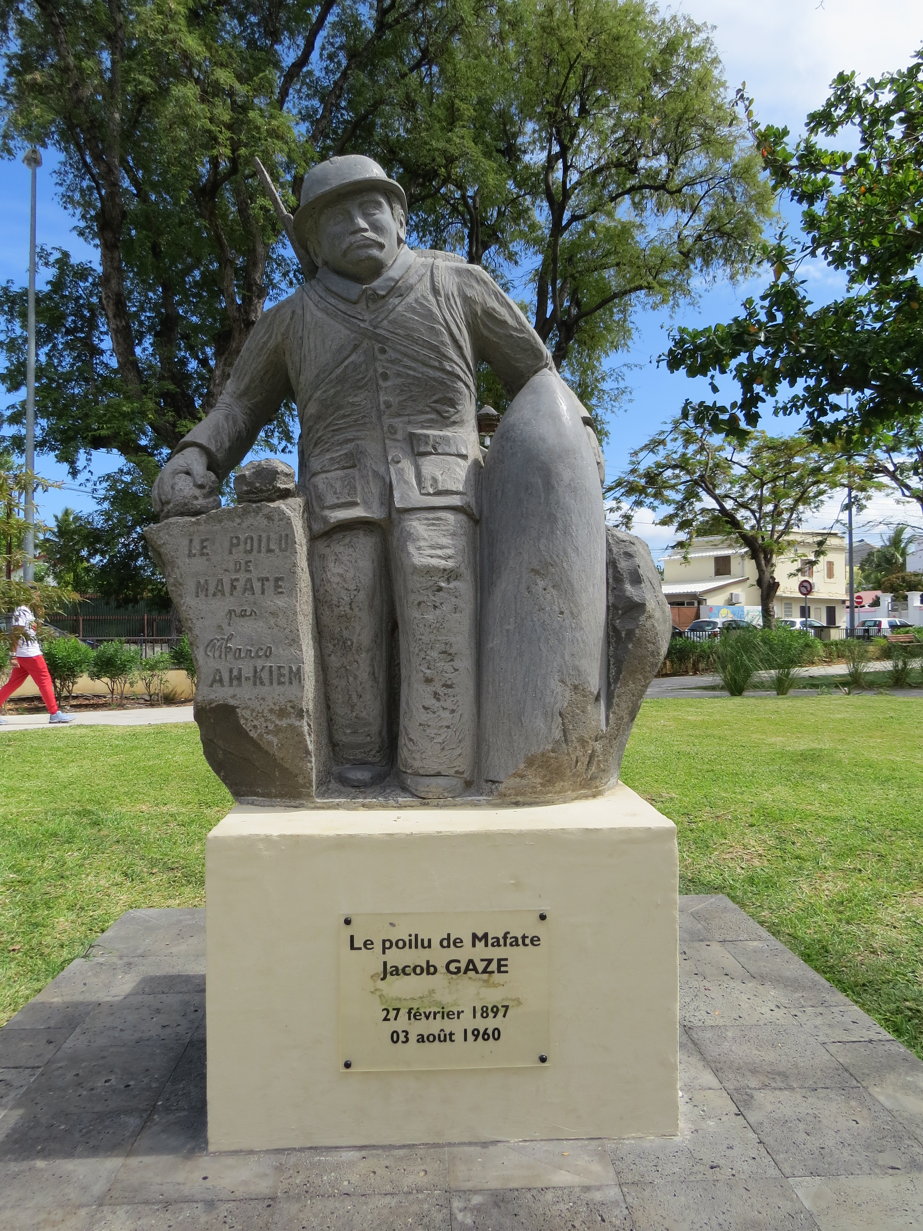 Statue située à Saint-Paul dans le Jardin de la Liberté